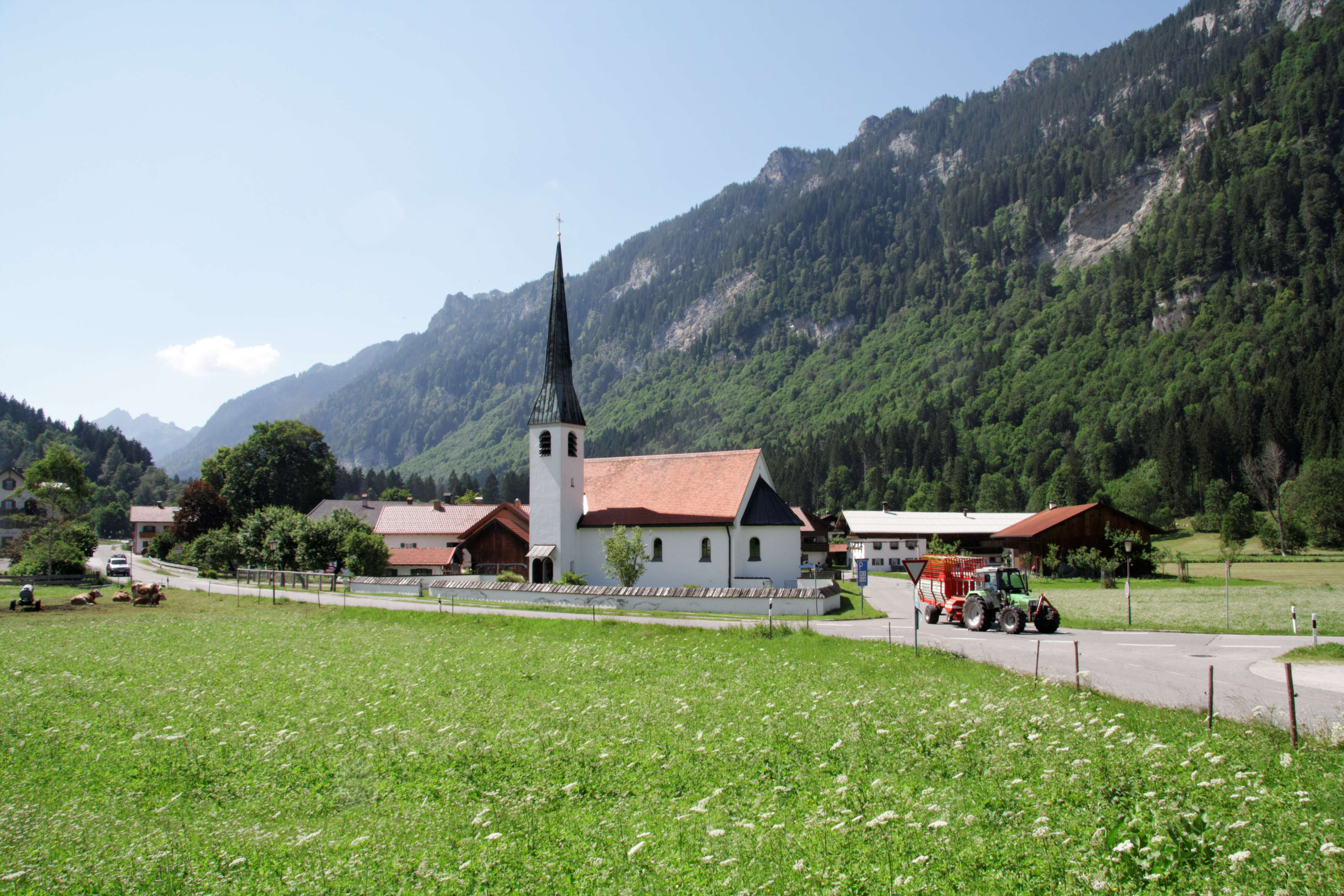 Ettal, Ansicht des Ortsteils Graswang von Südosten